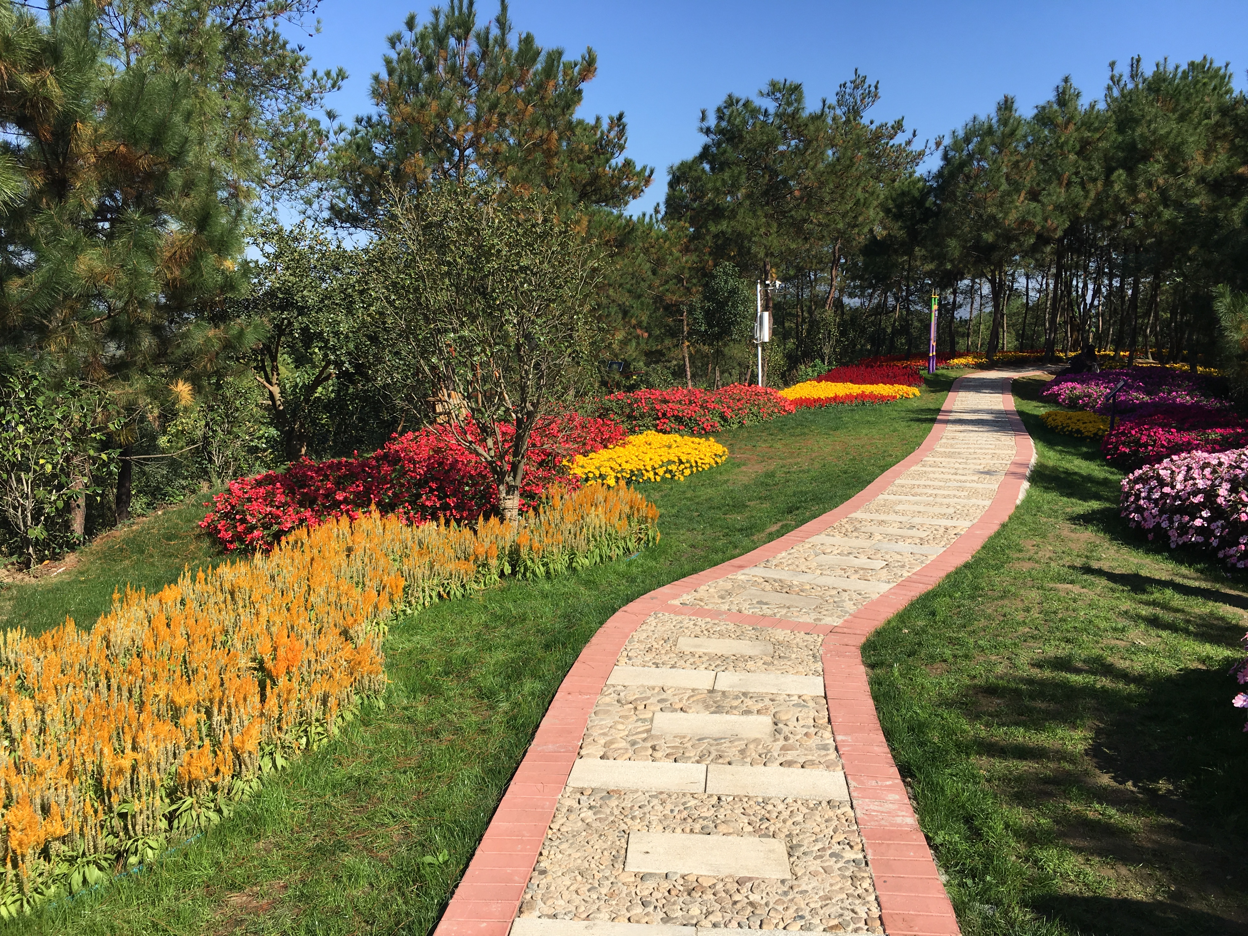 此图片为英山县四季花海旅游区的一部分